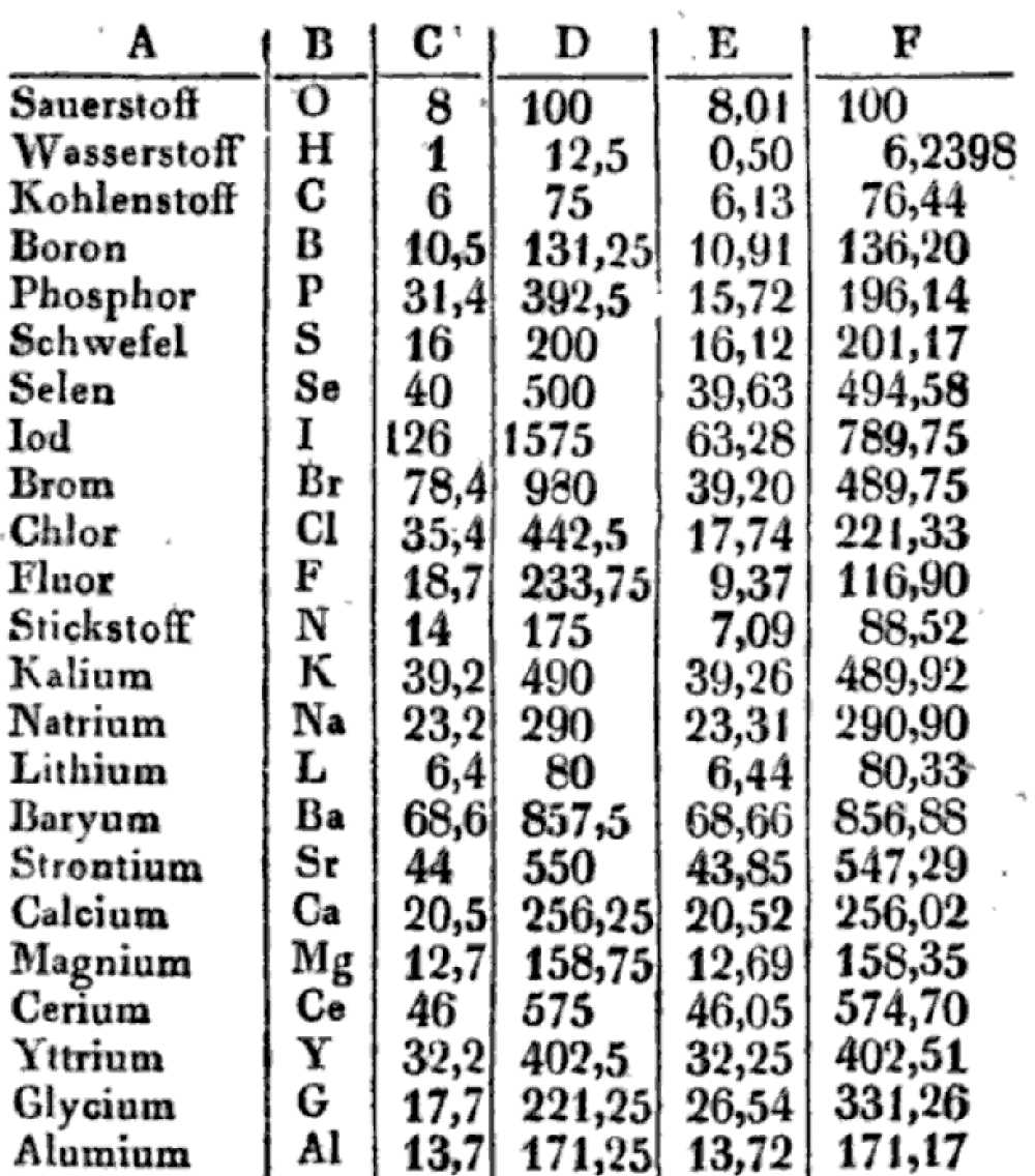 Atomgewichte, historisch